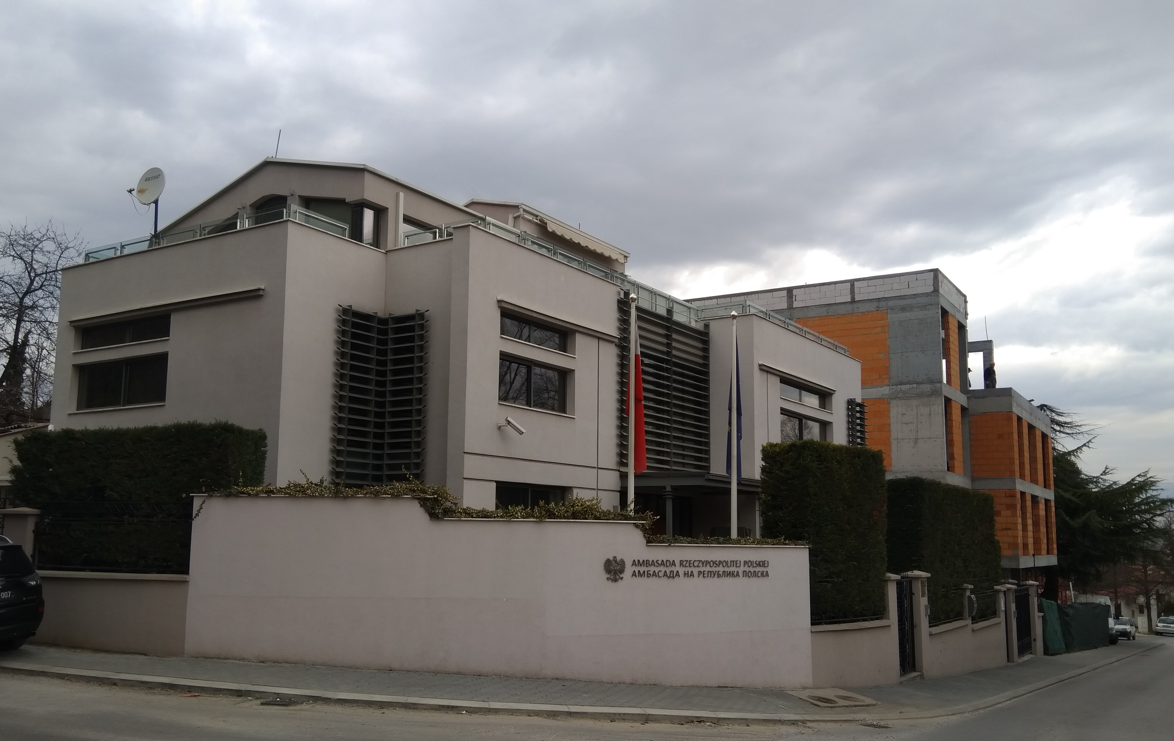 Ambasada Rzeczypospolitej Polskiej w Skopje